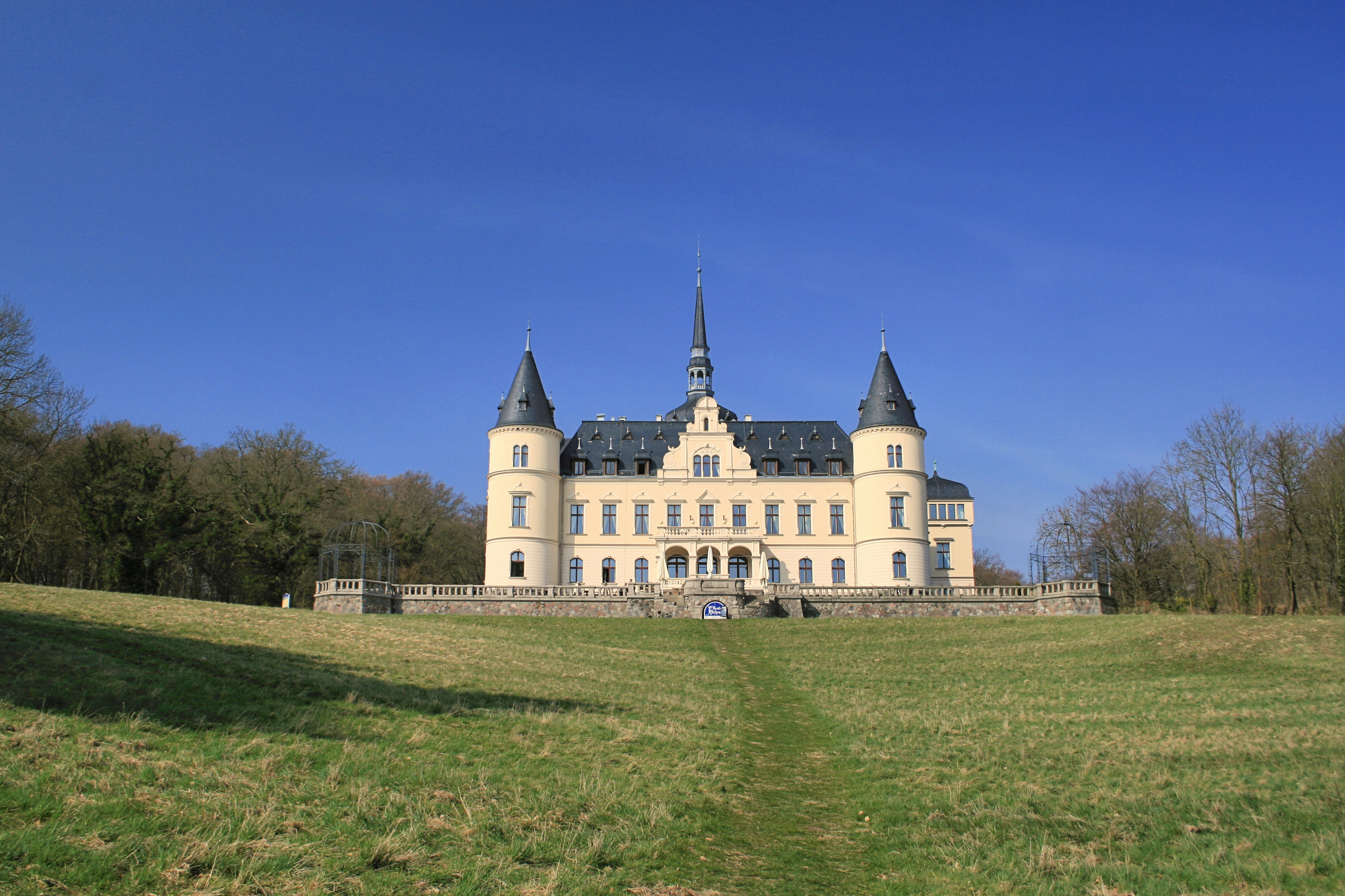 Schloss Ralswiek auf der Insel Rügen an der südlichsten Bucht des Großen Jasmunder Boddens (1893–1896 erbaut)